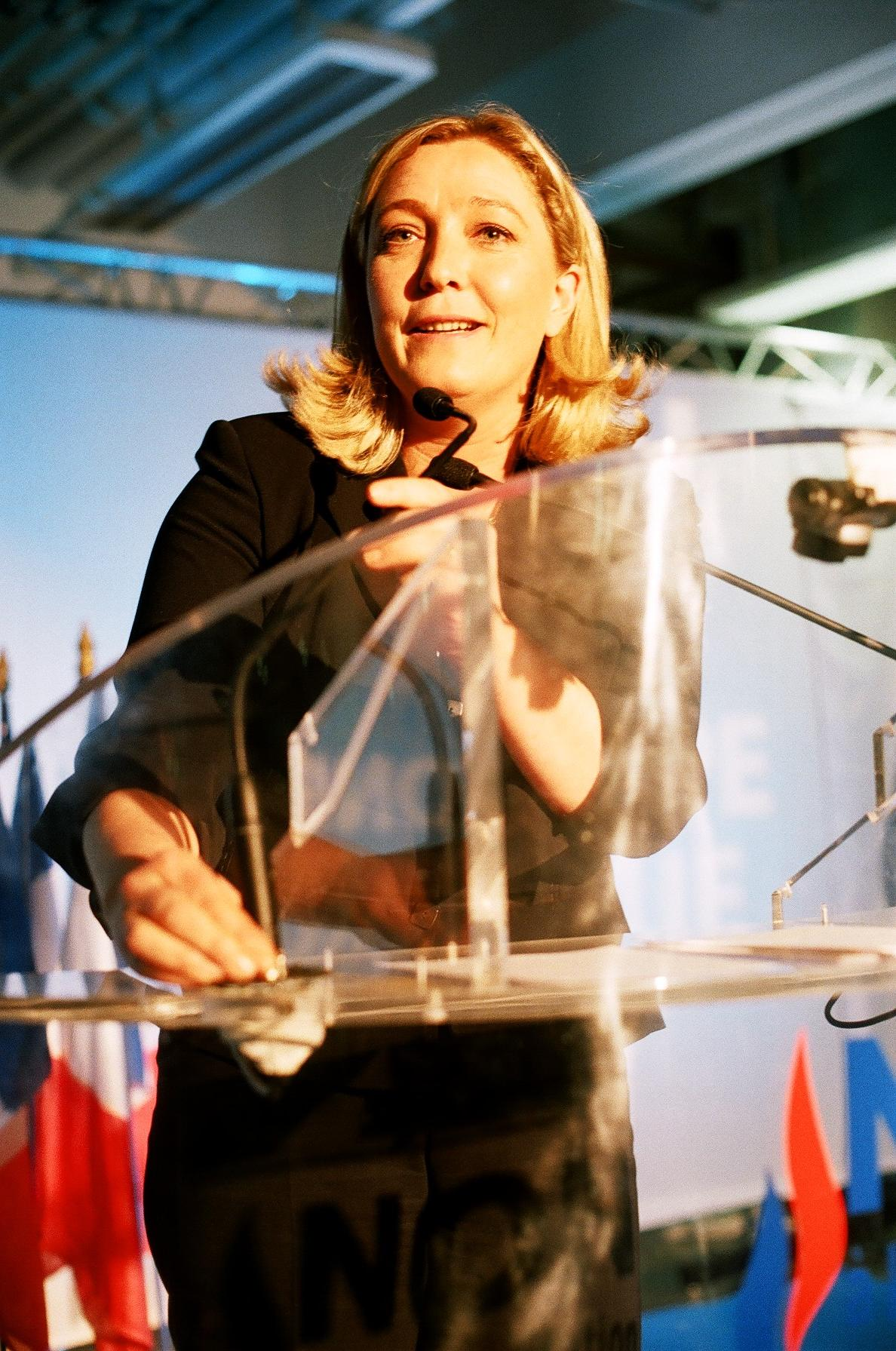 Marine Le Pen